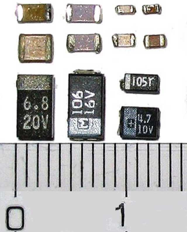 SMD-Kondensatoren